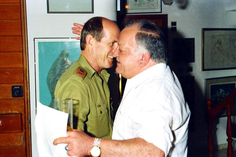 אלי אפללו המכונה השליש, שהשתתף בפיצוץ מלון המלך דוד בפגישה עם האלוף יוסי פלד, בחגיגות יום העצמאות ה- 40 למדינת ישראל